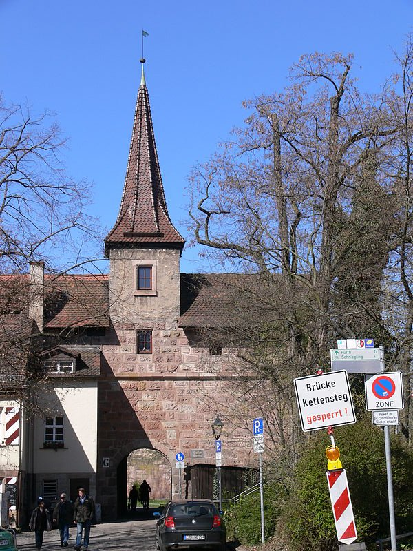 Nürnberg, Hallertor, Hallertürlein und Turm „Grünes G“